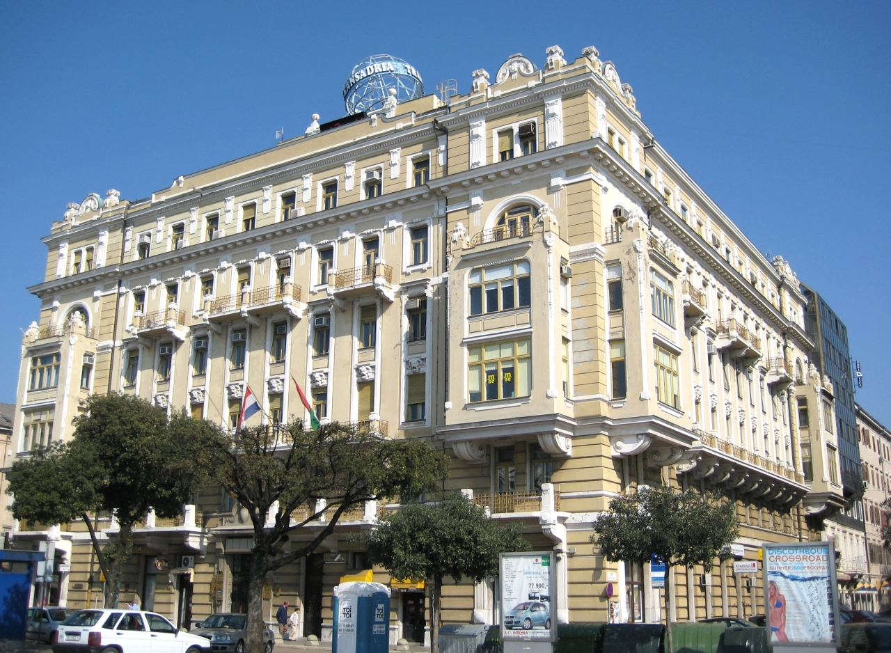 Zgrada Transadrie Rijeci.